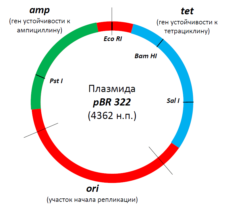 Карта плазмиды pBR 322, применяемой для клонирования участков чужеродной ДНК в клетках бактерии E. coli. Cпециально создана Франциско Болваром и Раймондом Родригесом с целью клонирования ДНК. Представляет собой циклический фрагмент ДНК длиной 4362 нуклеотидных пары. Плазмида содержит ген устойчивости к тетрациклину tet, взятый из естественной плазмиды pSC 101; ген устойчивости к ампициллину amp, взятый из транспозона Tn3; и участок начала репликации ori, заимствованный из плазмиды pMB 1. Плазмида содержит также сайты рестрикции Pst I, Bam HI и Sal I, причём первый находится в гене amp, а два остальных – в гене tet. Айала Ф., Кайгер Дж. Современная генетика: В 3-х т. Т. 1. Пер. с англ.: — М.: Мир, 1987. — 295 с., ил.